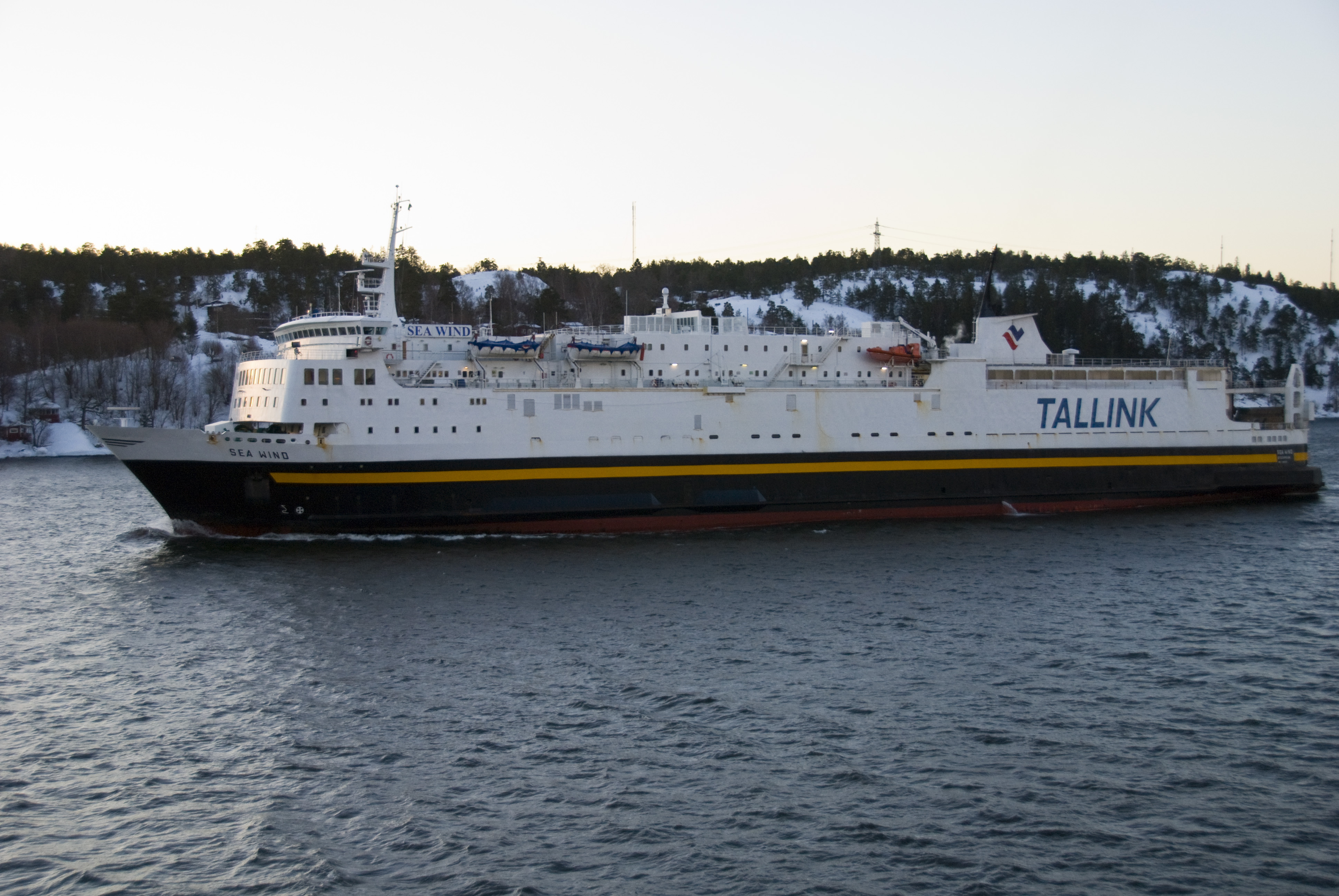 M/S Sea Wind i Halvkakssundet, Stockholm